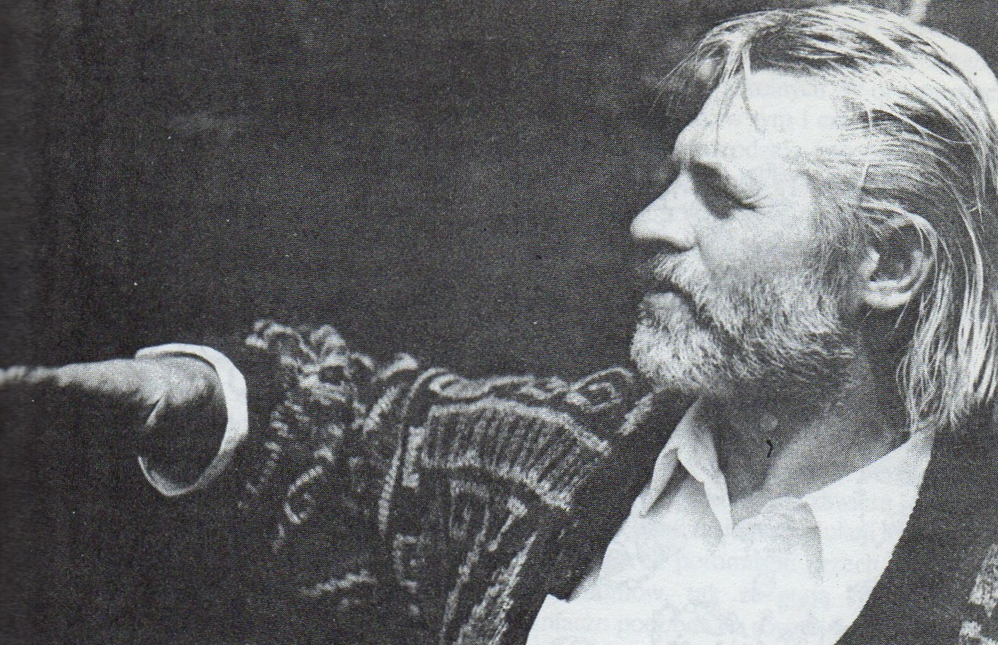 Piotr C. Kowalski - polski malarz ur. 1951r.